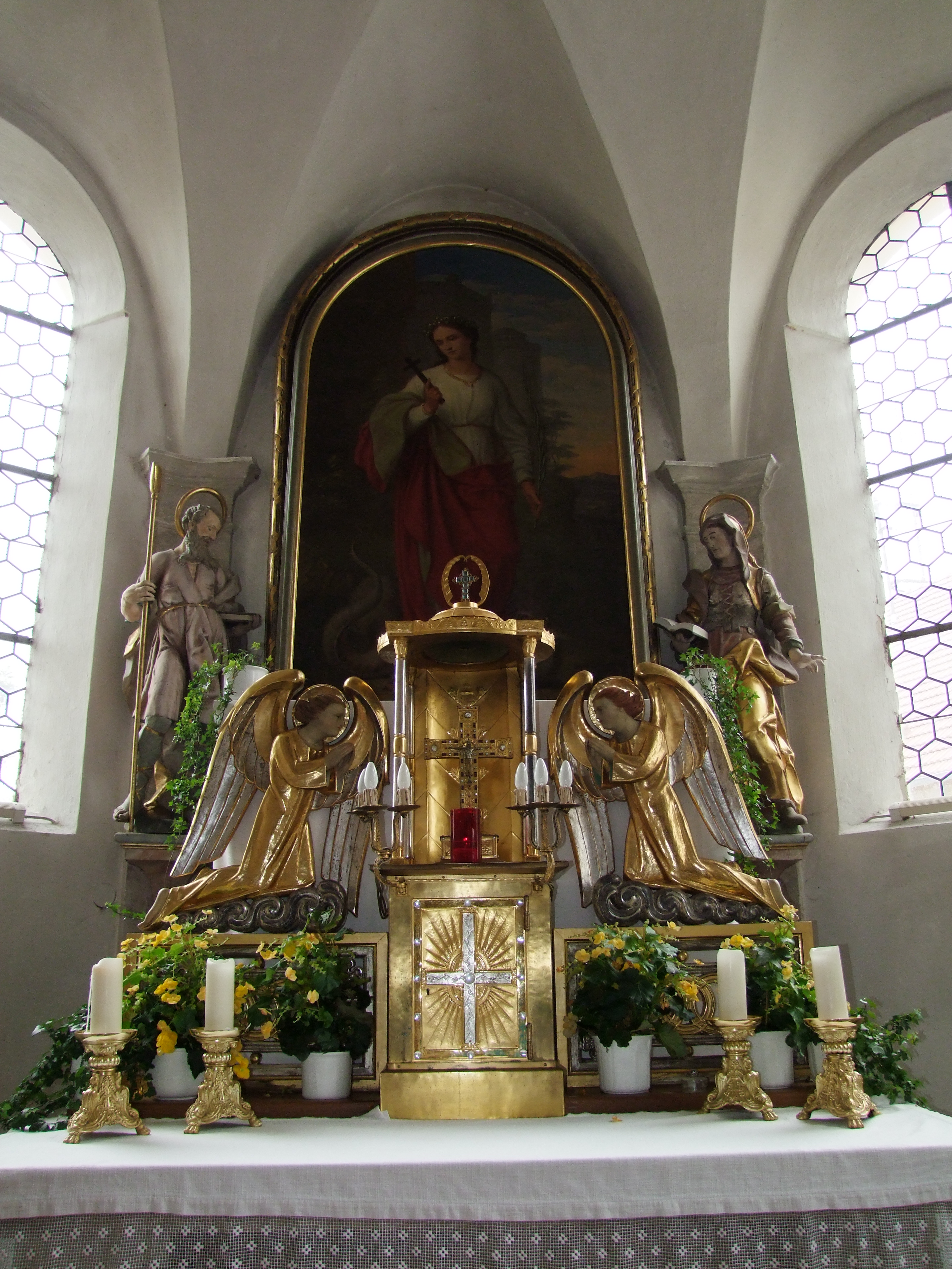 St. Margareta im oberschwäbischen Irsingen, einem Ortsteil von Türkheim in Bayerisch/Schwaben